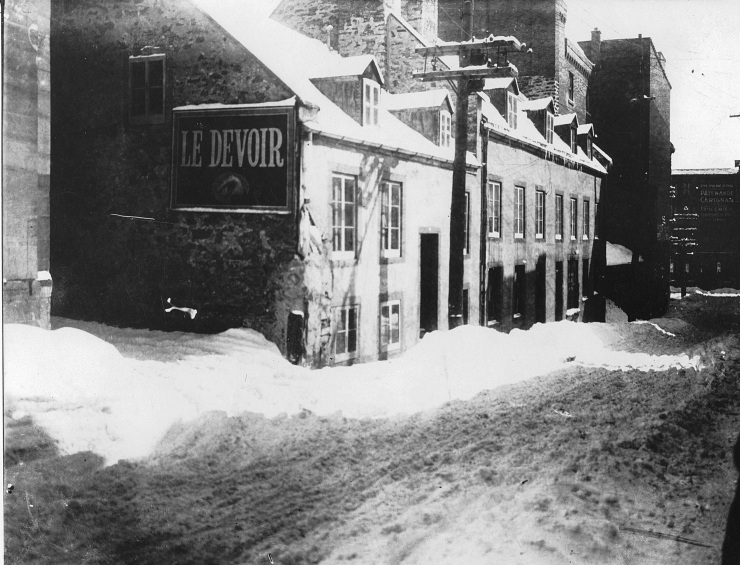 Une maison de la rue Saint-Vincent, à Montréal, QC, sur laquelle se trouvait une affiche du Devoir et qui était voisine du bâtiment du journal montréalais Le Devoir. Le bâtiment de quatre étages au numéro 443 rue Saint-Vincent, où se trouvaient les bureaux du Devoir de 1914 à 1924, n'est pas visible sur la photo. On en aperçoit un coin sur le côté gauche de la photo. La description originale du musée McCord était : « Bâtiment du journal « Le Devoir », rue Saint-Vincent, Montréal, QC, vers 1910 » Gélatine argentique 17 x 23 cm Don de Mr. George Iles au Musée McCord